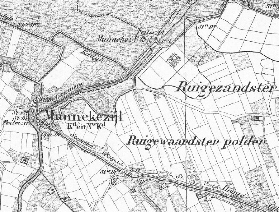 Waardsterpolder